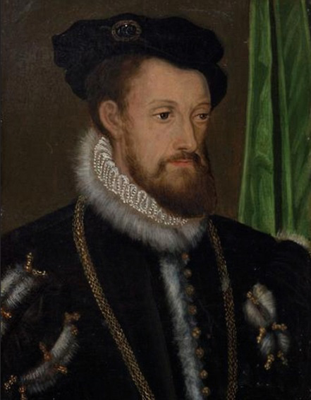 Portrait faisant partie d'un ensemble représentant des membres de la Maison de Lorraine.